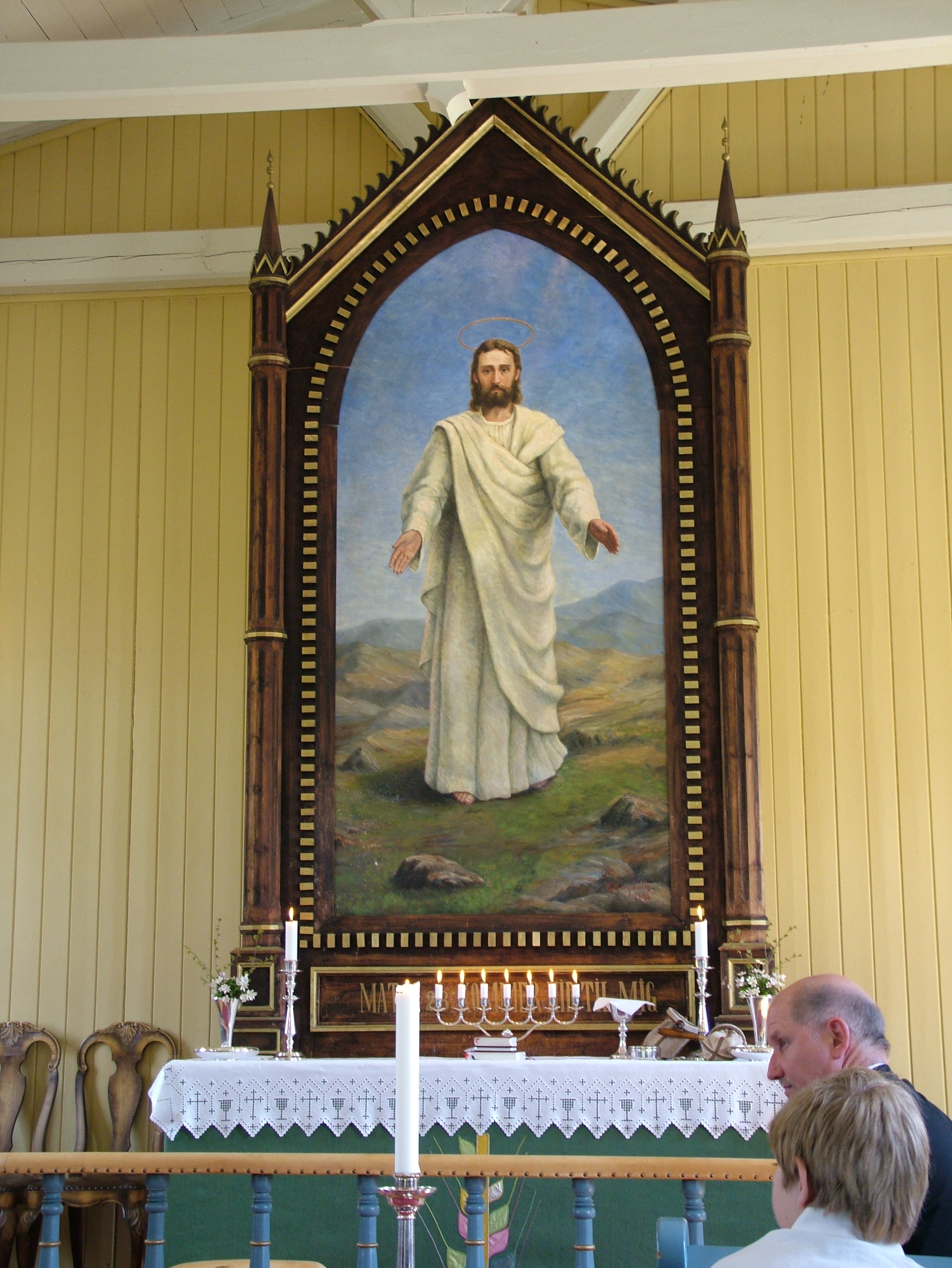 Altertavlen i Lundersæter kirke, malt av Valborg Luth i 1899. Bildet bærer tittelen: «Kristus på Bergprekenens fjell».